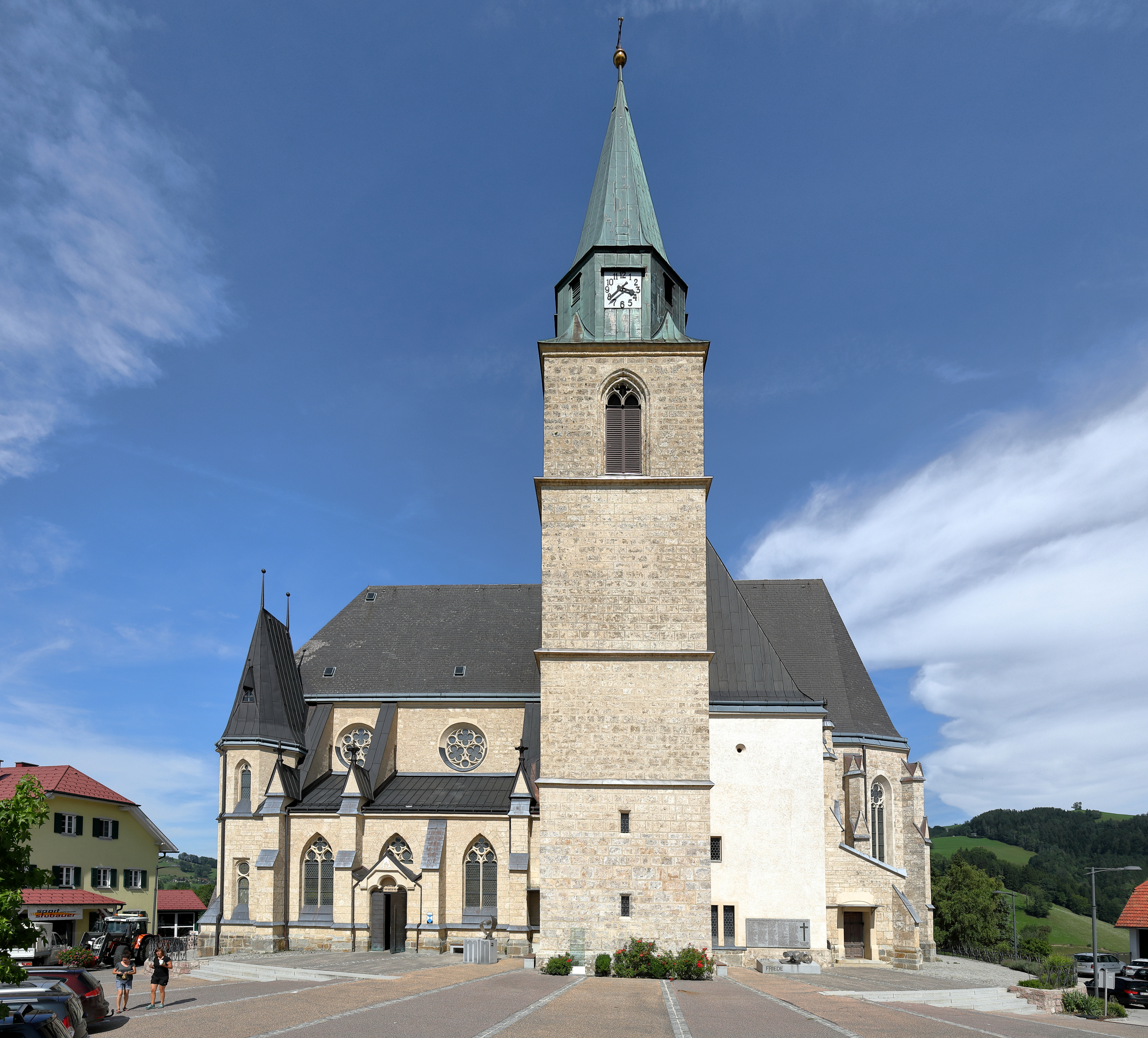 Westsüdwestansicht der röm.-kath. Pfarr- und Wallfahrtskirche hll. Maria und Oswald in der oberösterreichischen Gemeinde Maria Neustift.Ursprünglich eine geostete, spätgotische Kirche aus dem Ende des 15. Jahrhunderts. Nach schweren Sturmschäden entschloss man sich 1886 zum Neubau der Kirche. Ab 1891 wurde nach Plänen des Architekten Raimund Jeblinger in Nordsüdrichtung eine neues Langhaus mit Chorraum in neogotischem Stil errichtet und am 29. 9. 1898 von Diözesanbischof Franz Maria Doppelbauer feierlich geweiht. Der Chorraum von der Vorgängerkirche blieb erhalten und wurde als östliche Seitenkapelle integriert. Der mächtige Turm stammt ebenfalls von der Vorgängerkirche und erhielt 1931 einen neuen Turmhelm.